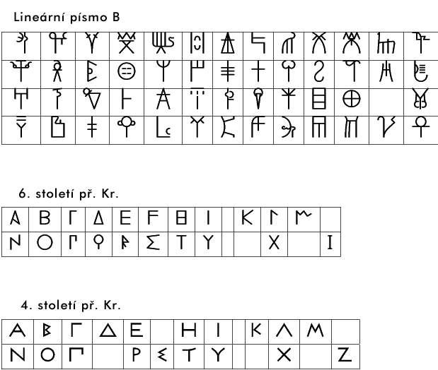 Řecká abeceda